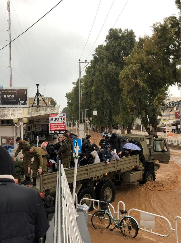 כוחות צה"ל פועלים לסיוע בחילוץ אזרחים באזורי ההצפות בצפון הארץ. כוחות צה"ל מעוצבת "הגליל", לוחמי קומנדו, שריון, הנדסה, תותחנים, חי"ר וזרוע הים, הוקפצו לסיוע באירועי ההצפות.